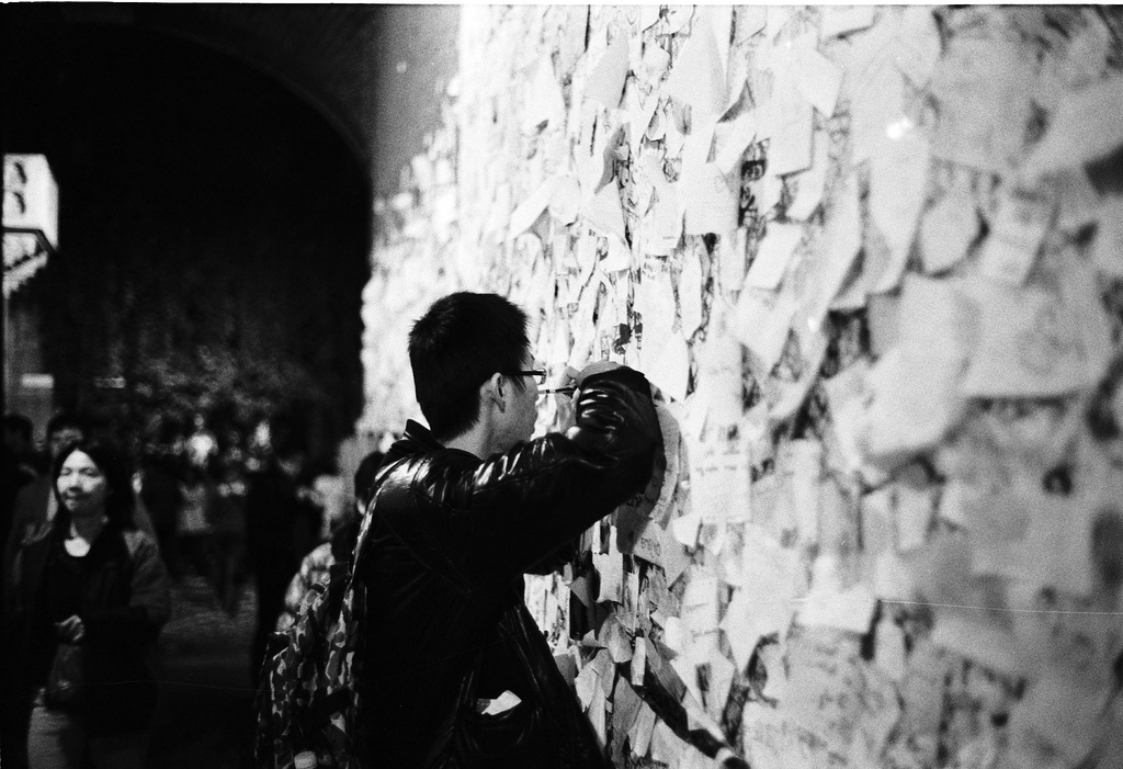 Muro con tutte le lettere e dediche fatte dai turisti a Giulietta, Verona (Italy) 1999 immagine scansionata da rullino, fatta M6. M6 + VC 40/1.4, TA 1/30s Ilford HP5 Plustek OpticFilm 7600i